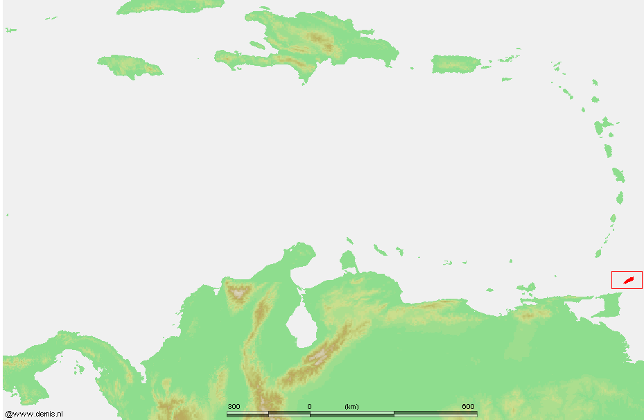 Caribbean - Tobago.PNG